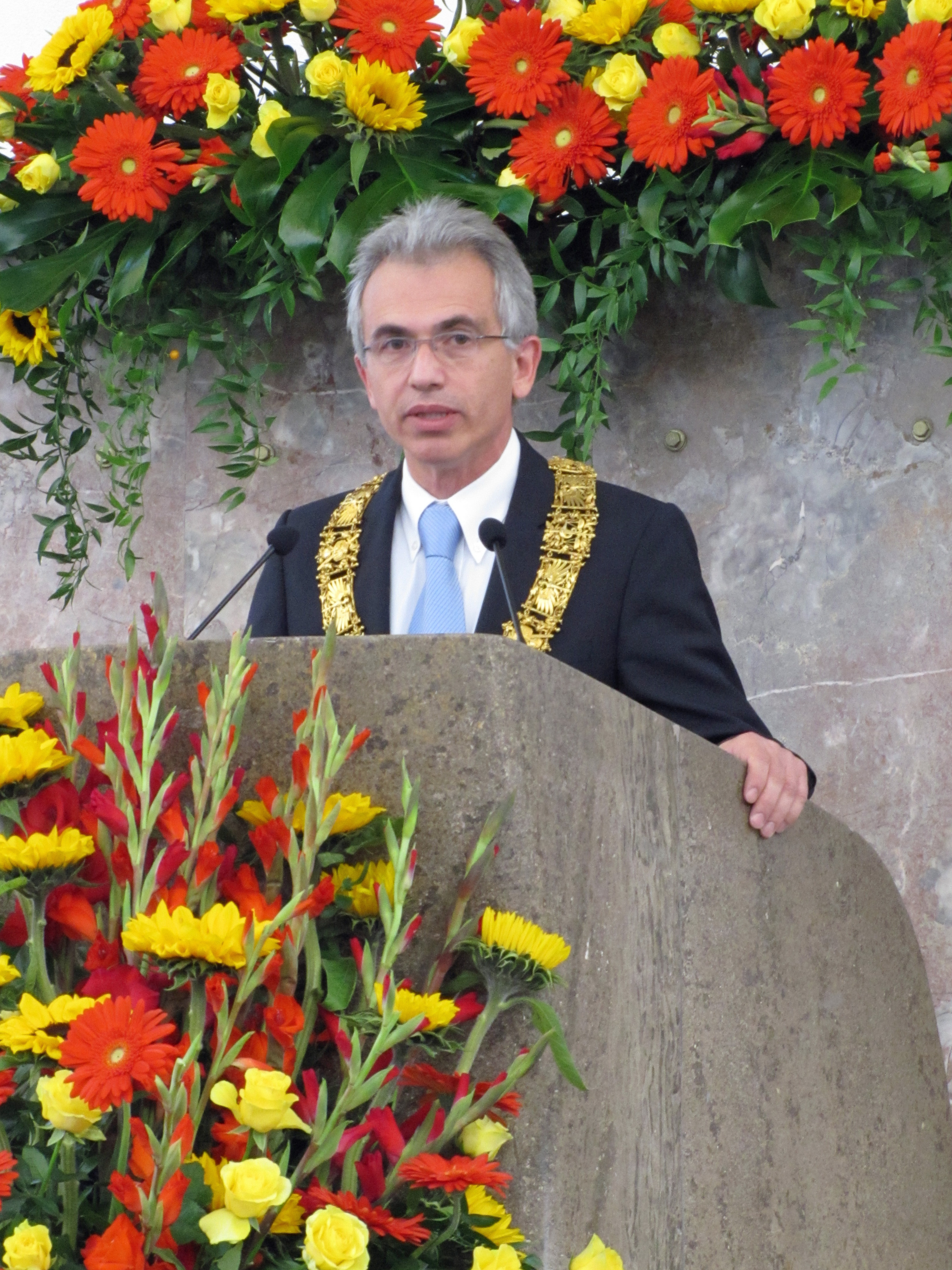 Oberbürgermeister Peter Feldmann, 2012 als Begrüssungsredner zum Tag der Deutschen Einheit in der Frankfurter Paulskirche.